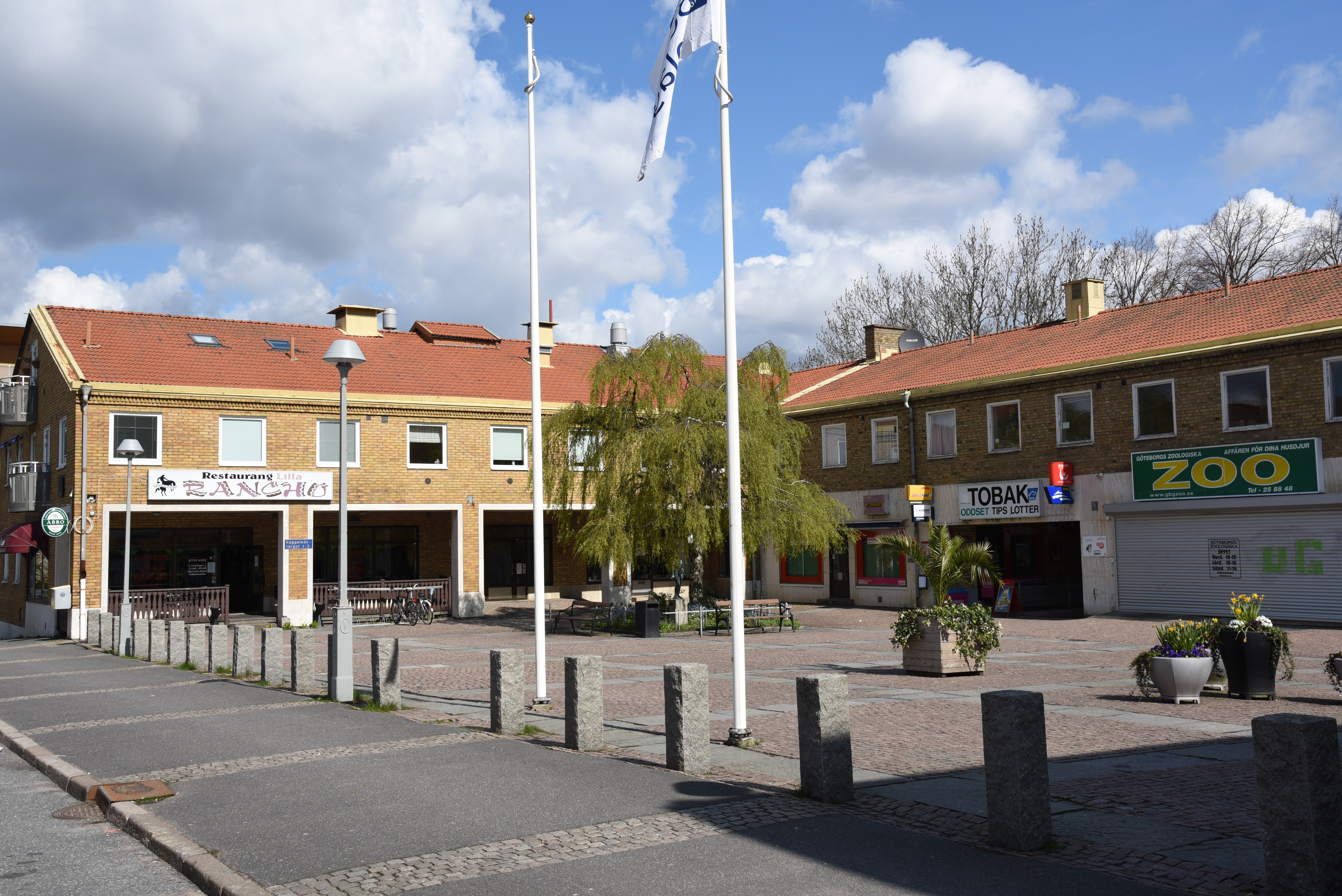 Kaggeledstorget i stadsdelen Sävenäs i Göteborg.